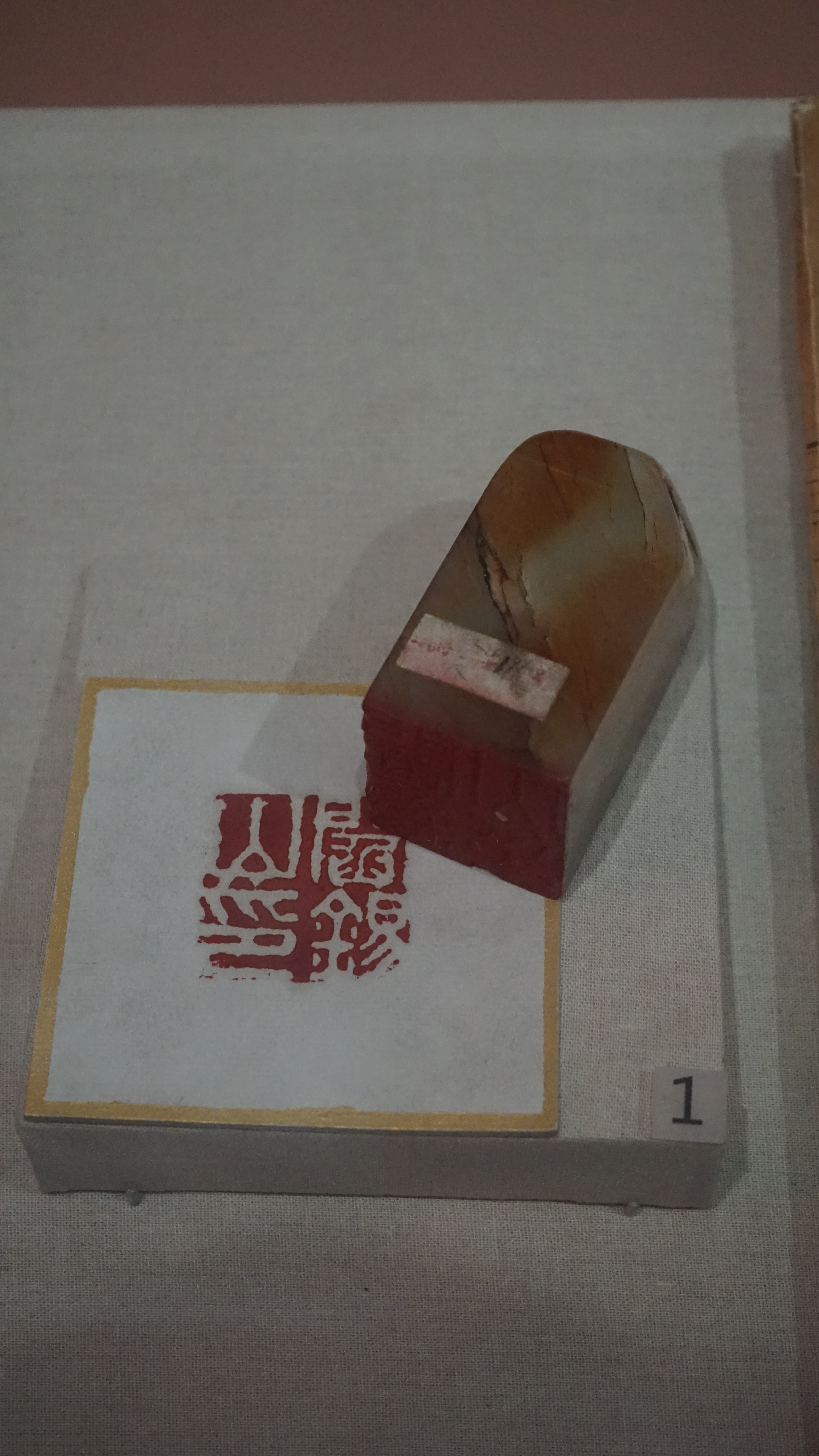 中文（中国大陆）: 解放军攻占太原，结束了阎锡山在山西38年的通知。这是缴获的阎锡山印章。一级文物。